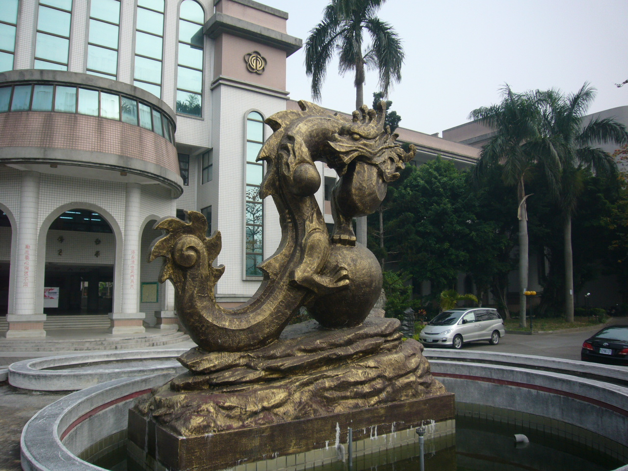 台北市立大同高級中學龍池